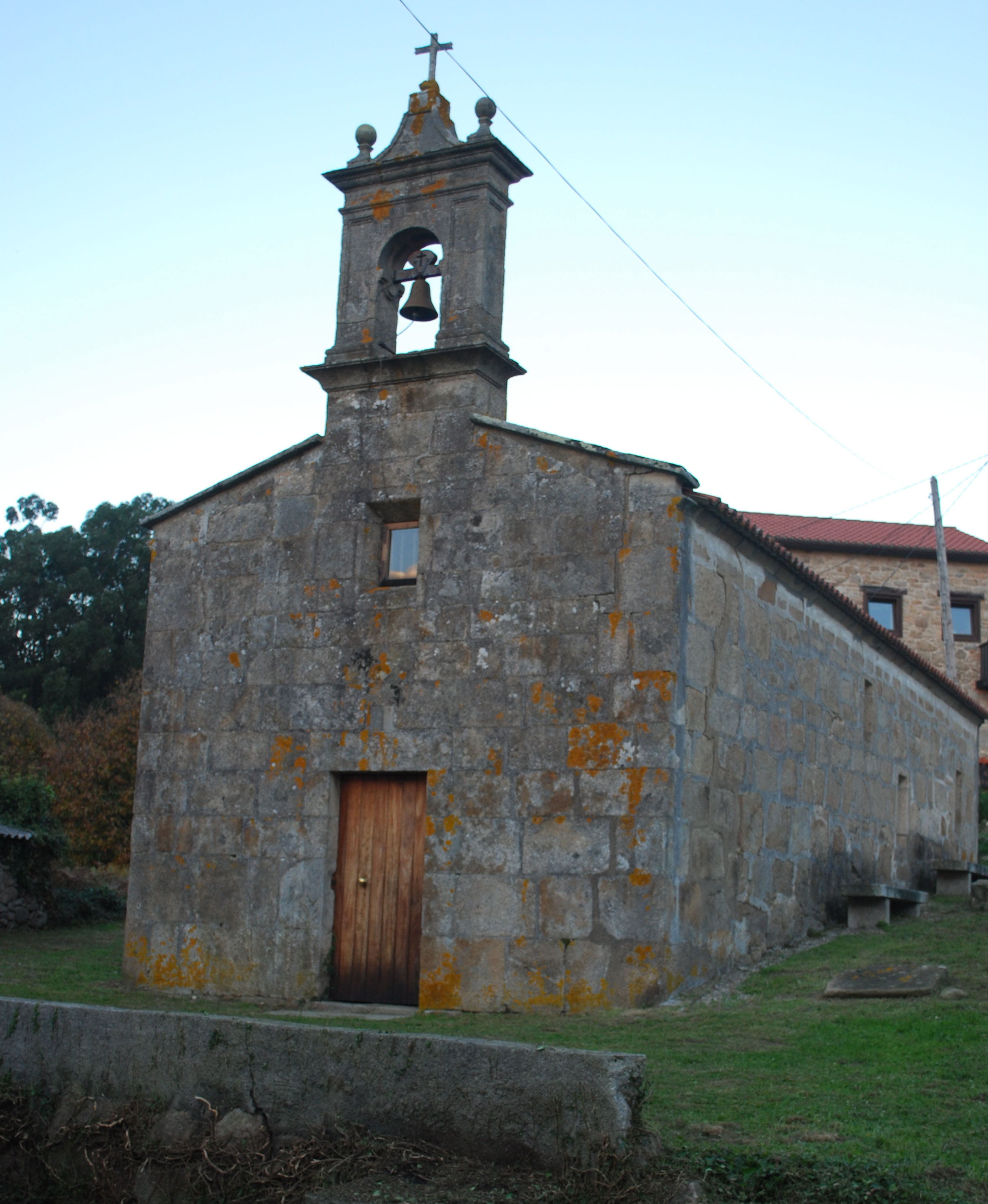 Vista da igrexa de Santa Icía de Morás, Arteixo A Coruña Galiza Spain